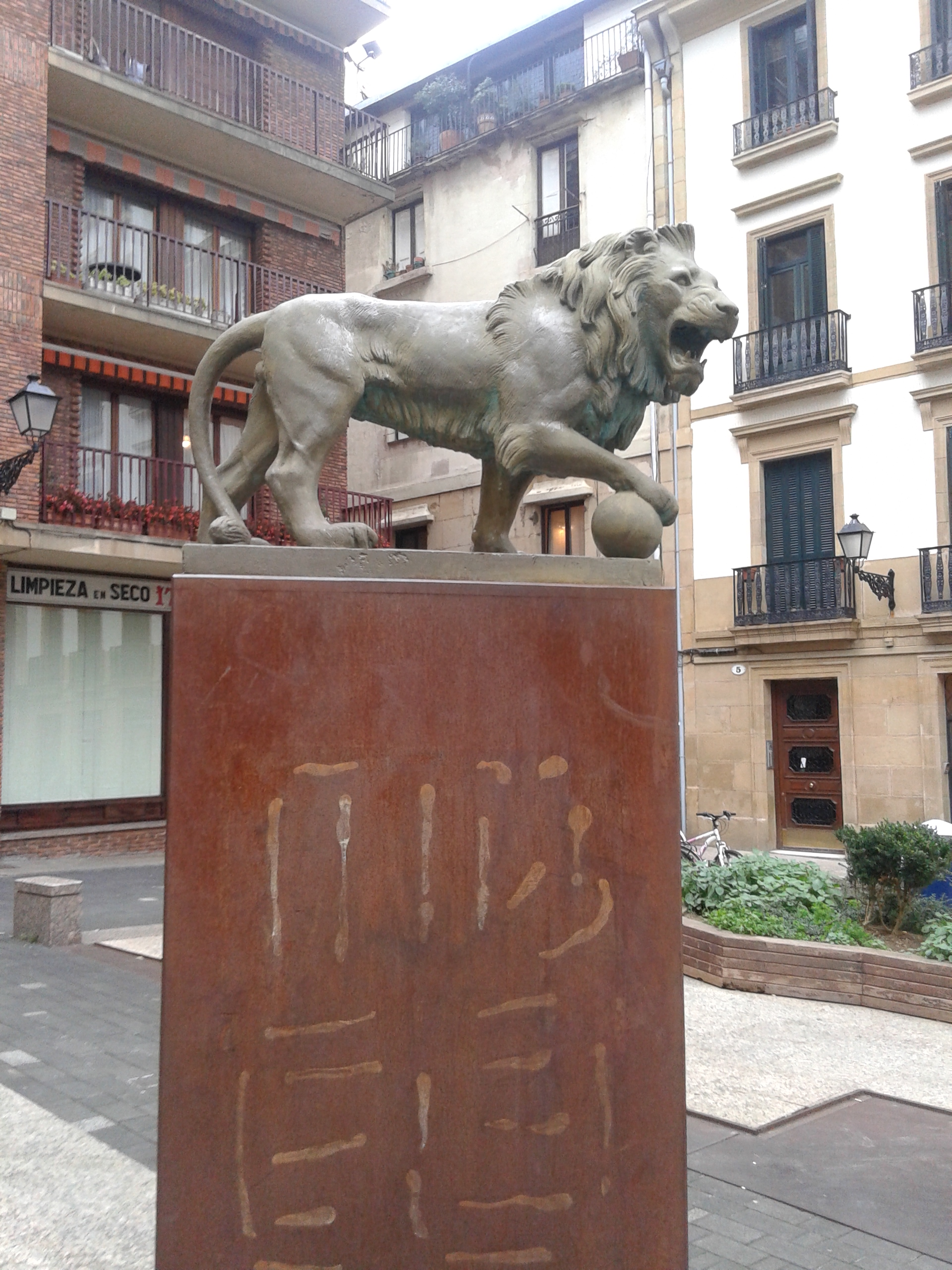 Donostiako iturri zaharrenetarikoa.